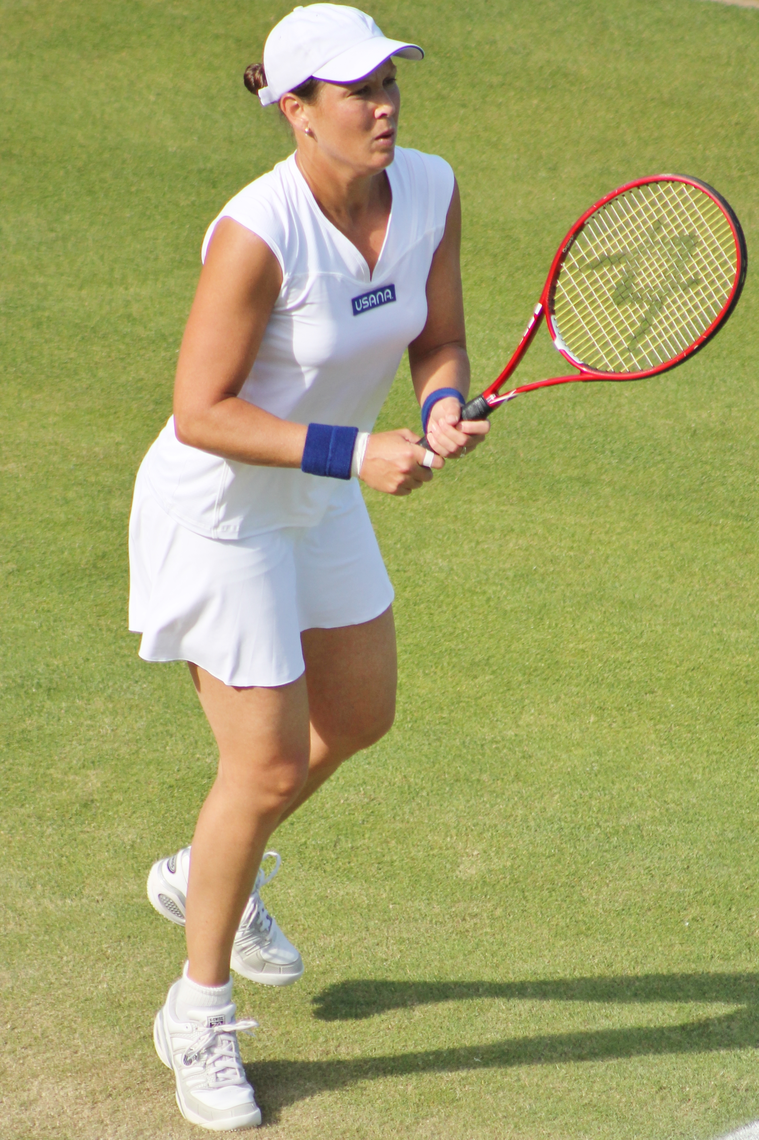 Huber WM13-003